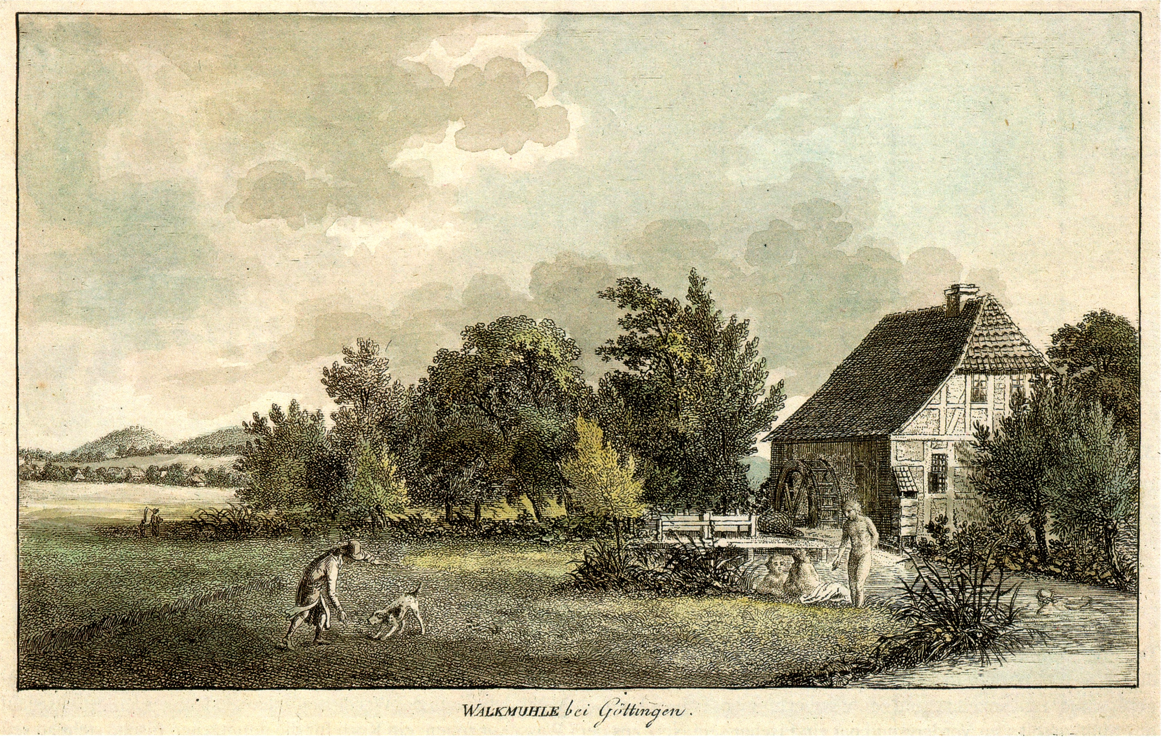 Walkemühle am Leinekanal südlich der Innenstadt von Göttingen. Aquarellierte Radierung